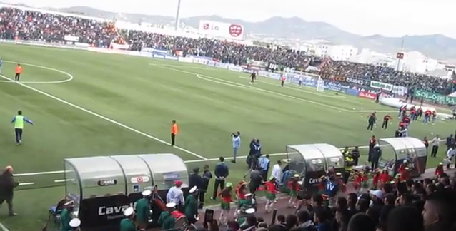 Stadio di Saniat Rmel